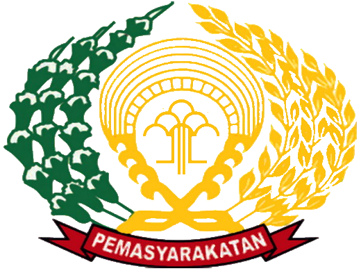 Lambang Lembaga Pemasyarakatan Indonesia Sesuai PERMEN Hukum & HAM RI. No. M.HH-02.KP.07.02 Tgl. 10 Oktober 2011